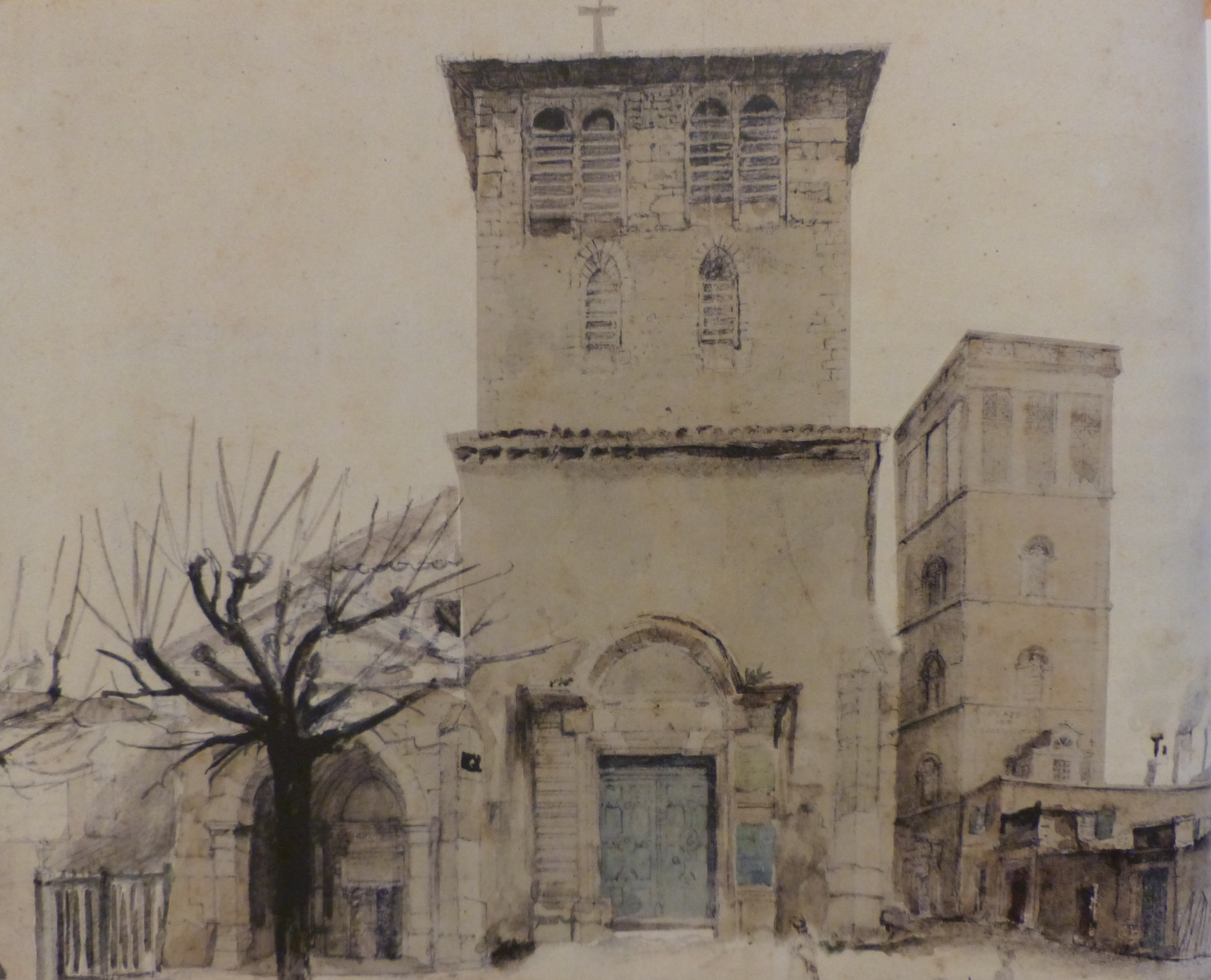 La petite église de Fourvière au XIXe siècle, avant les aménagements du site, la reconstruction du clocher et sa surélévation.